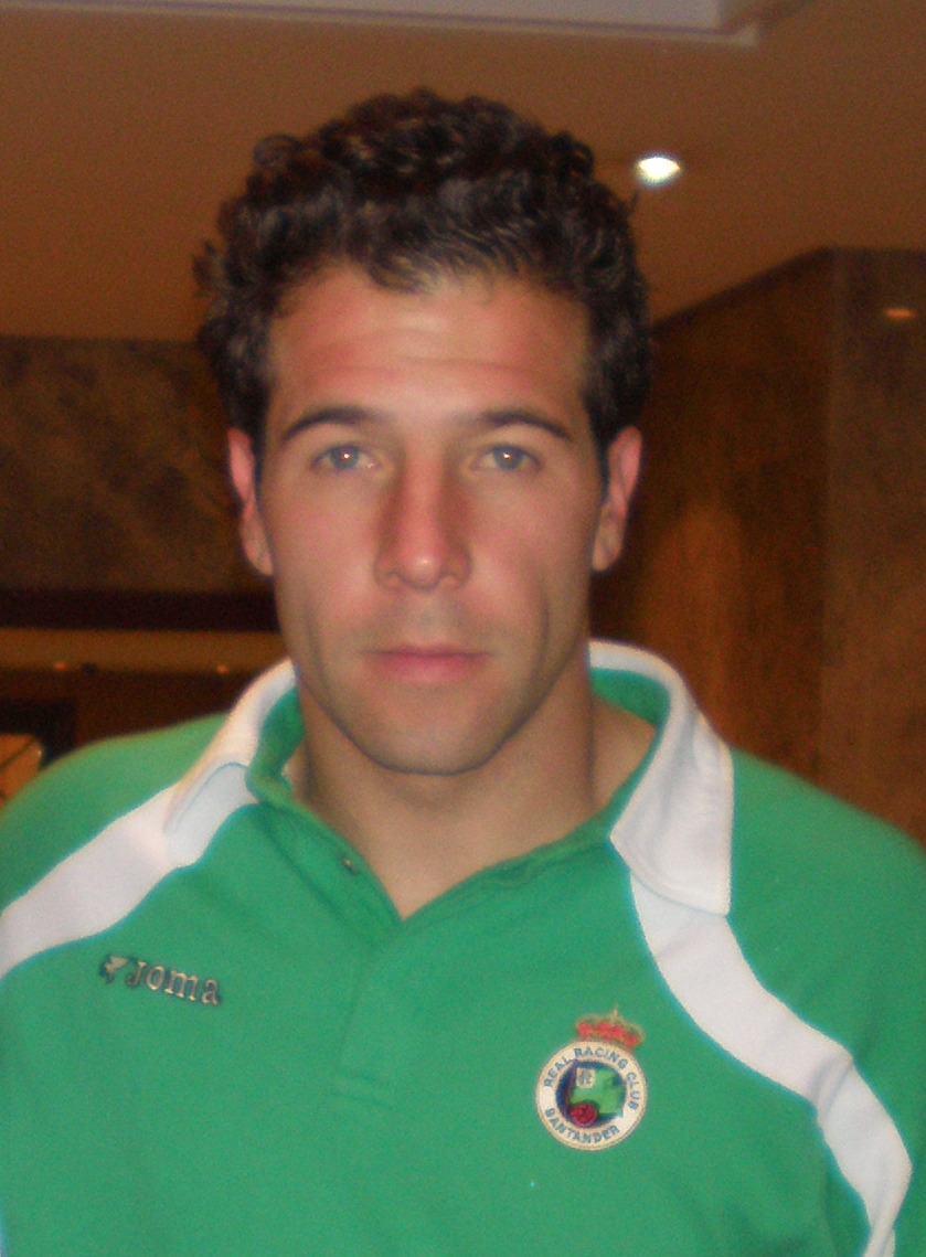 Toño Martínez